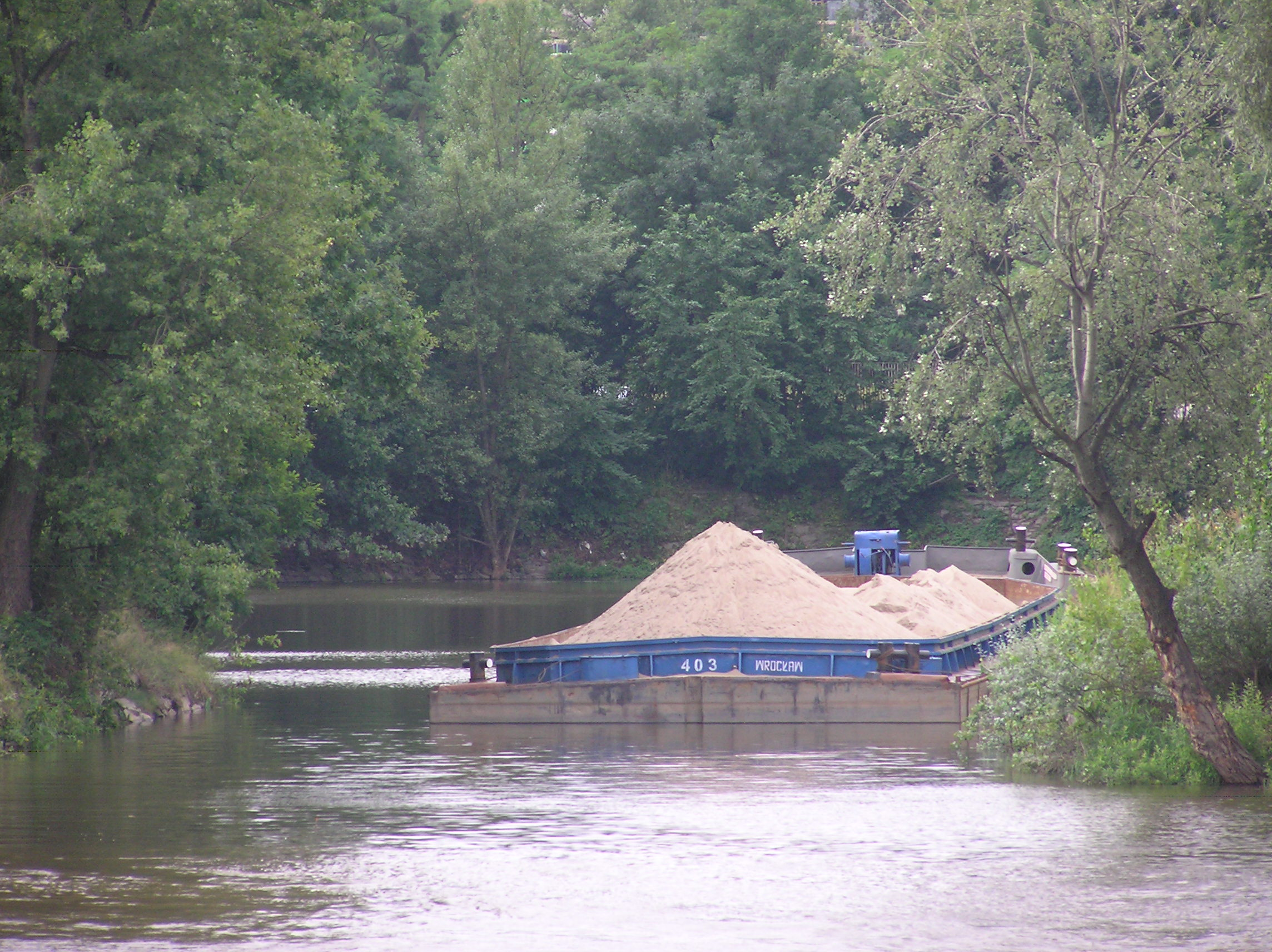 Wrocław, Port Ujście Oławy